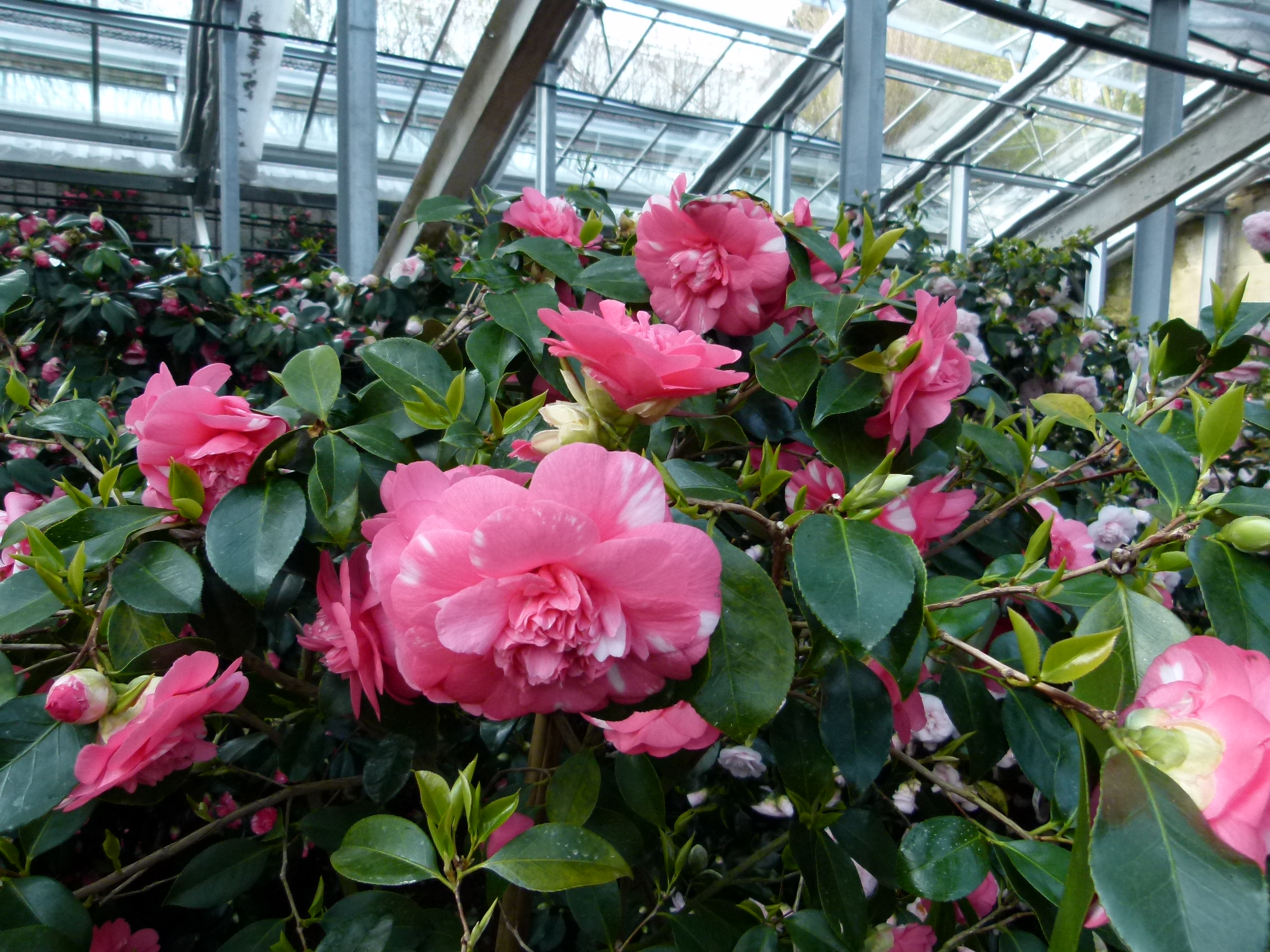 Kamelienblütenschau, Botanische Sammlungen im Landschloss Pirna-Zuschendorf, Sachsen